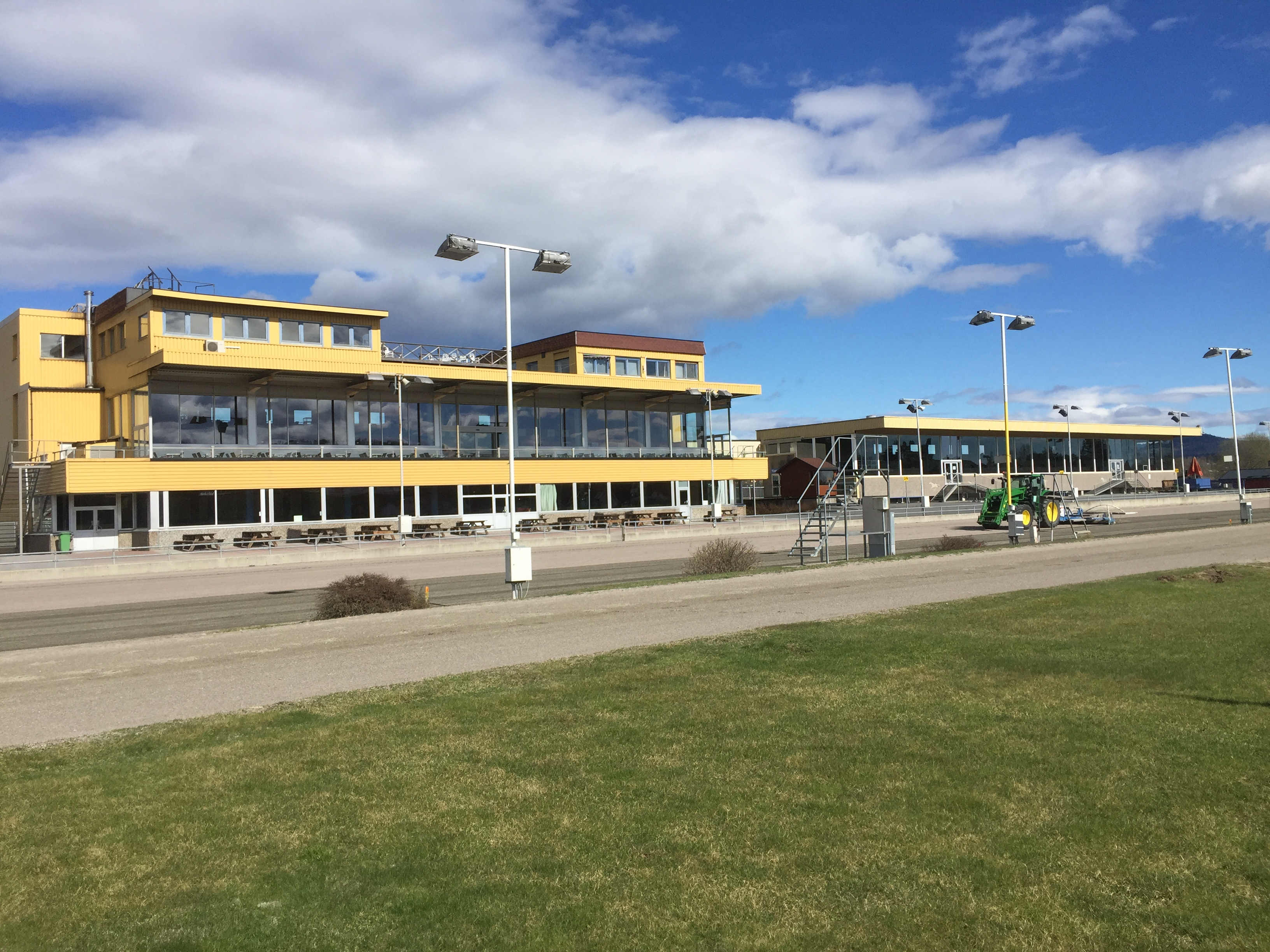 Hovedbygg ved banen inneholder Restauranter og Tribuner samt administrasjonen.